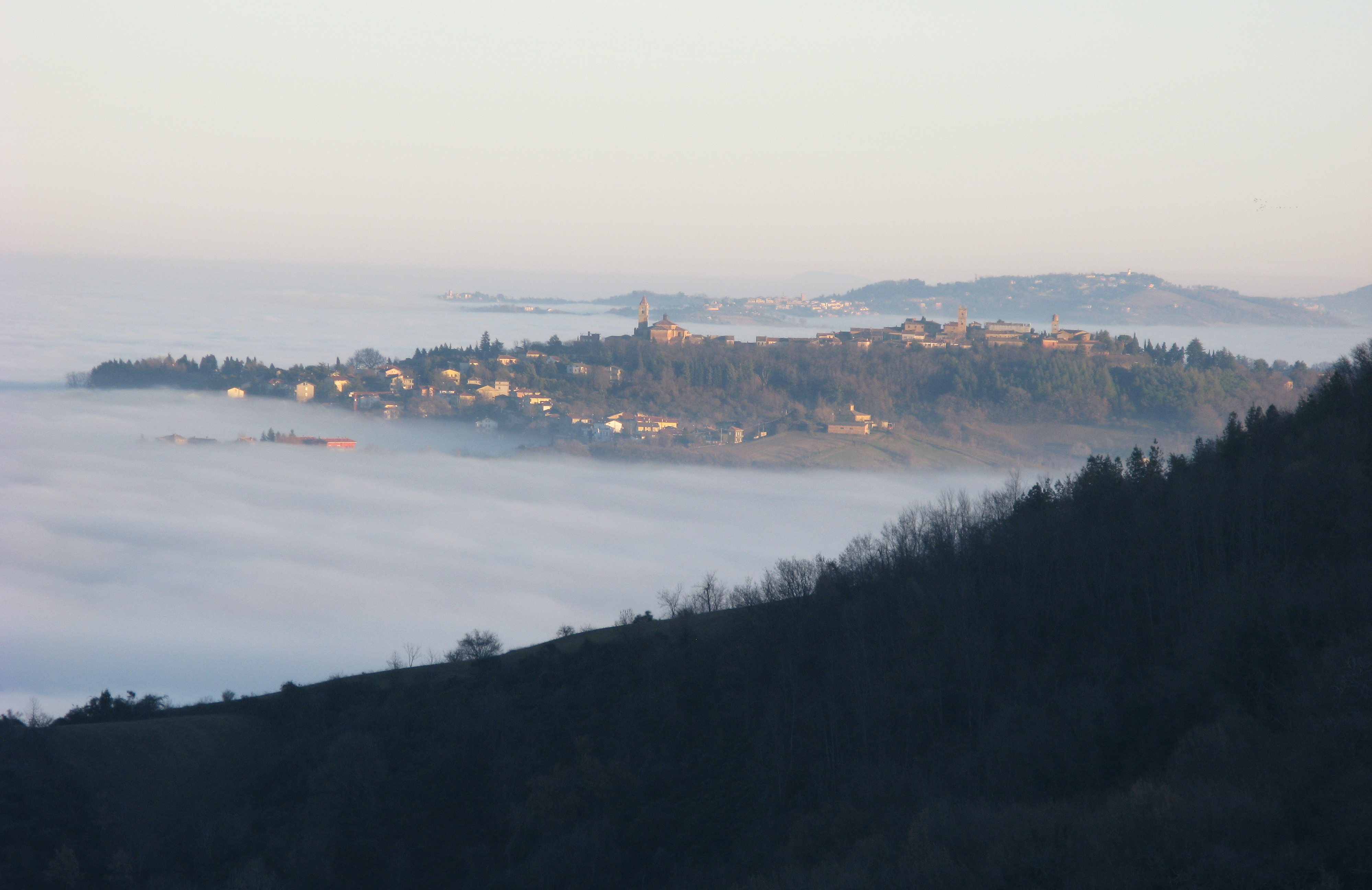 Panorama di Saludecio con la nebbia.